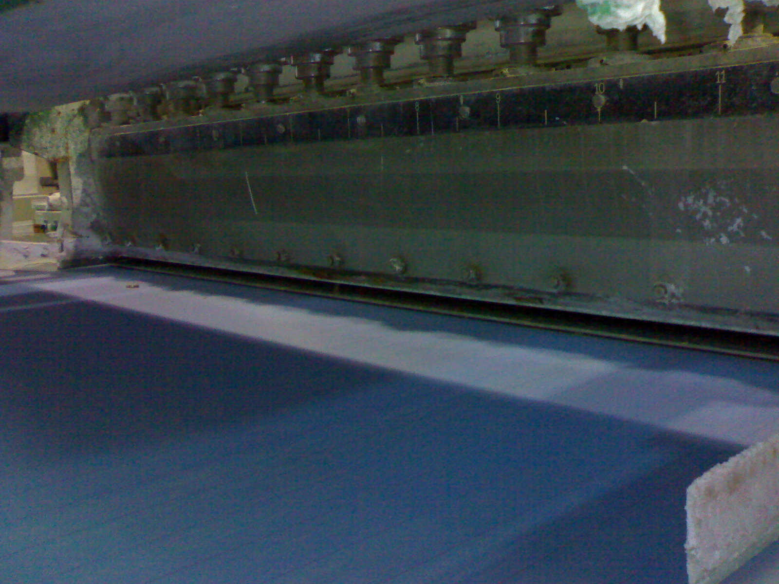 Cabeza de maquina de papel